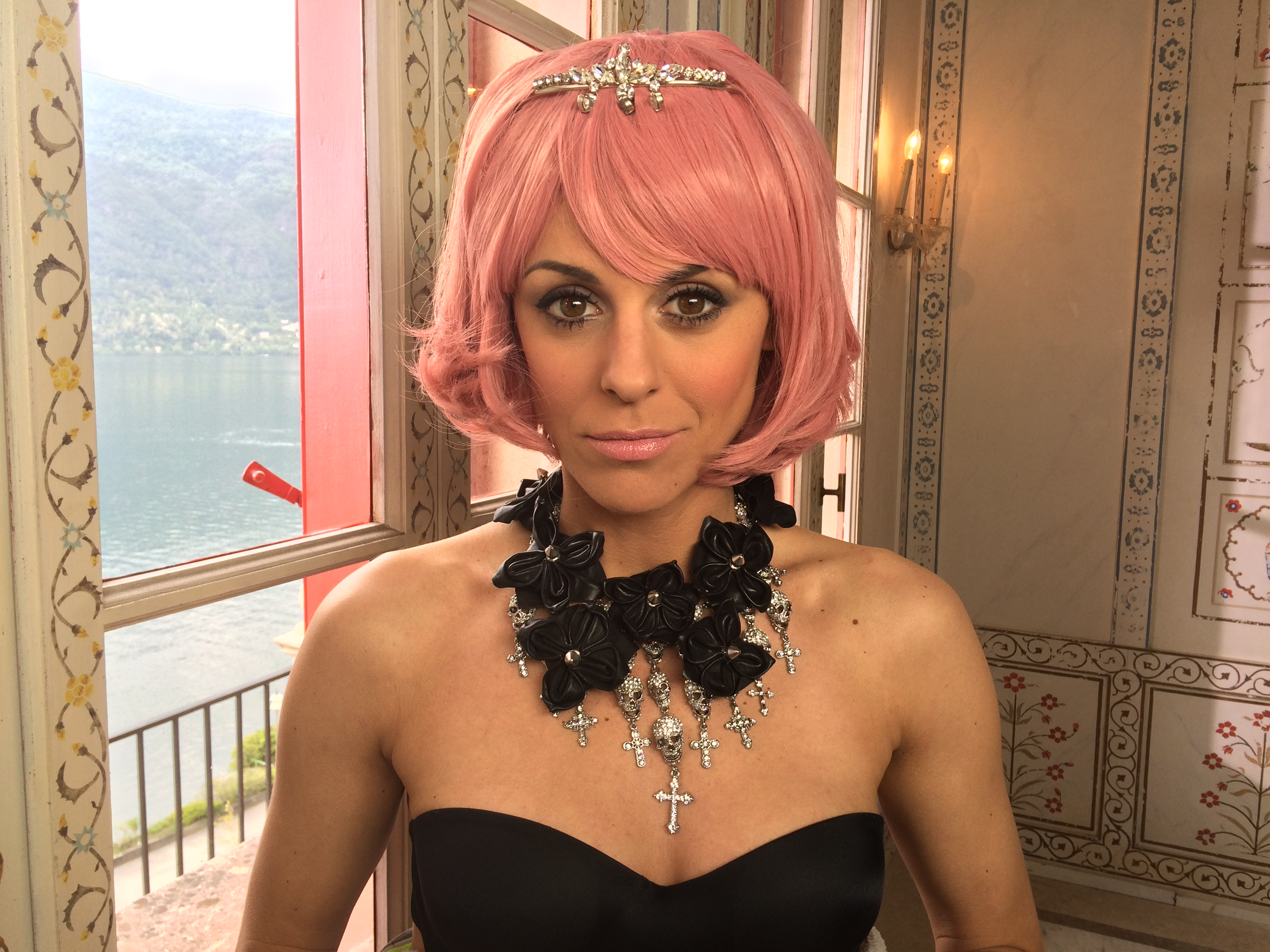 Clarissa Tami - Backstage della sigla iniziale di Cash (RSI LA1), 2016